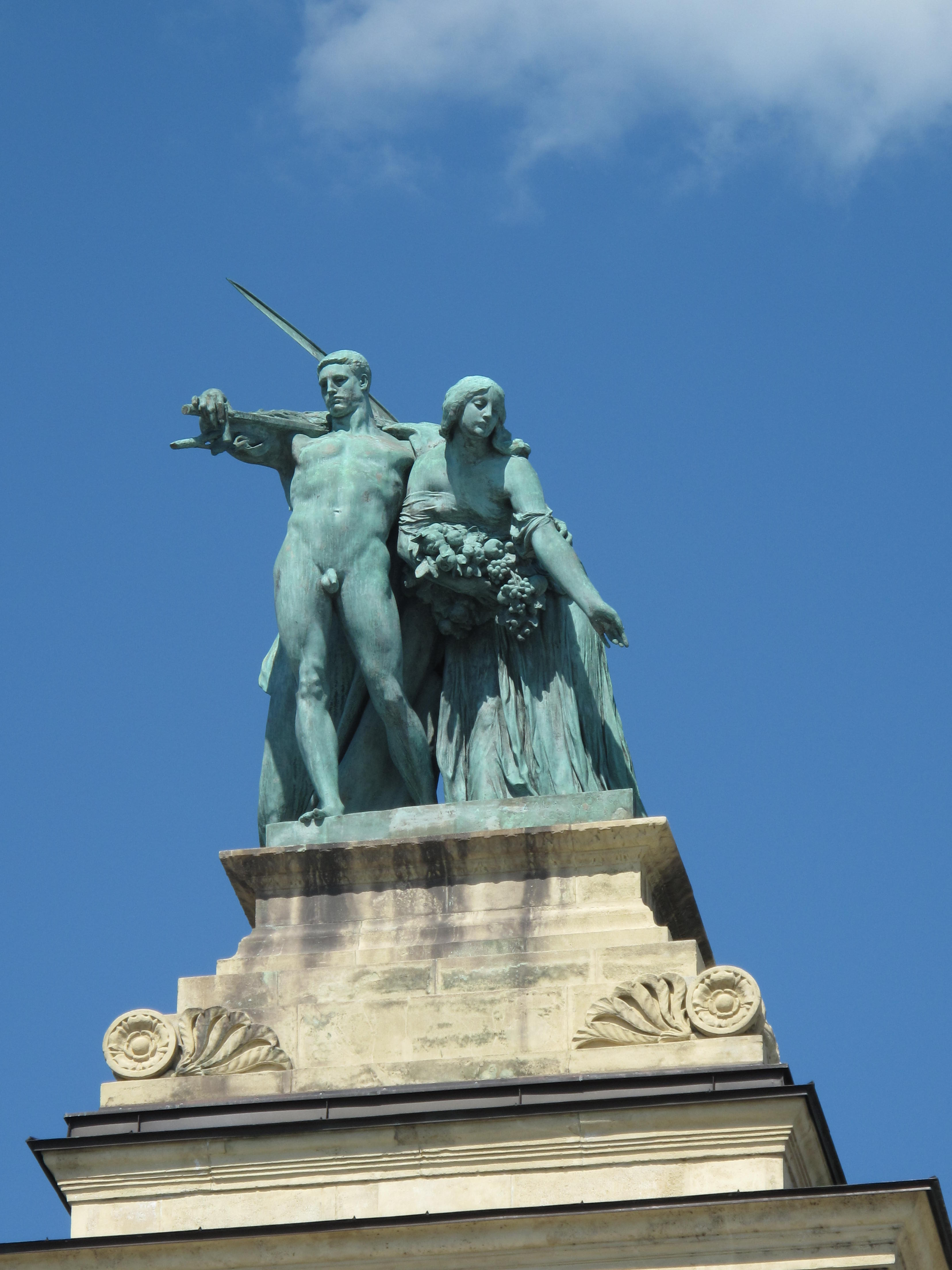 Náměstí Hrdinů, Budapešť